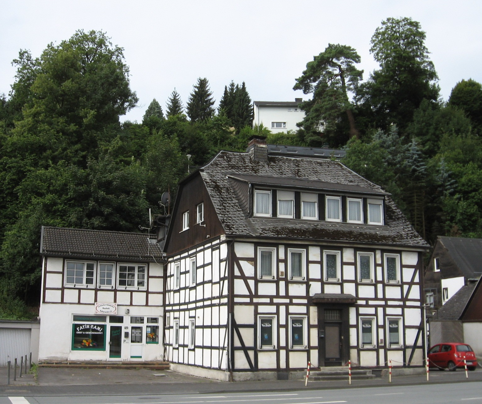 Die von 1988 bis 2008 genutzt erste Fatih Moschee an der Arnsberger Straße in Meschede.